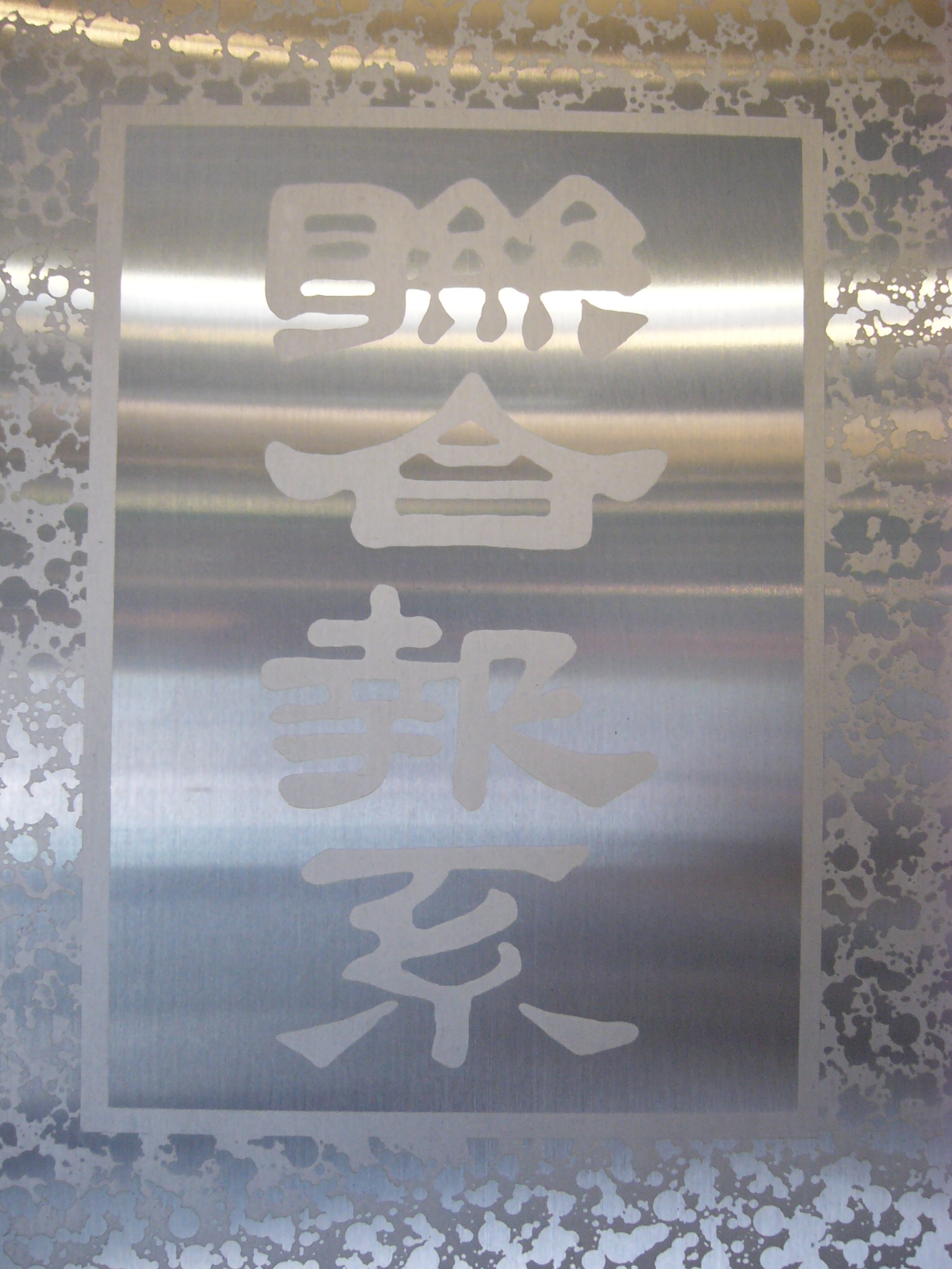 聯合報系第一代中文題字，位於聯合報第三大樓一樓電梯門。